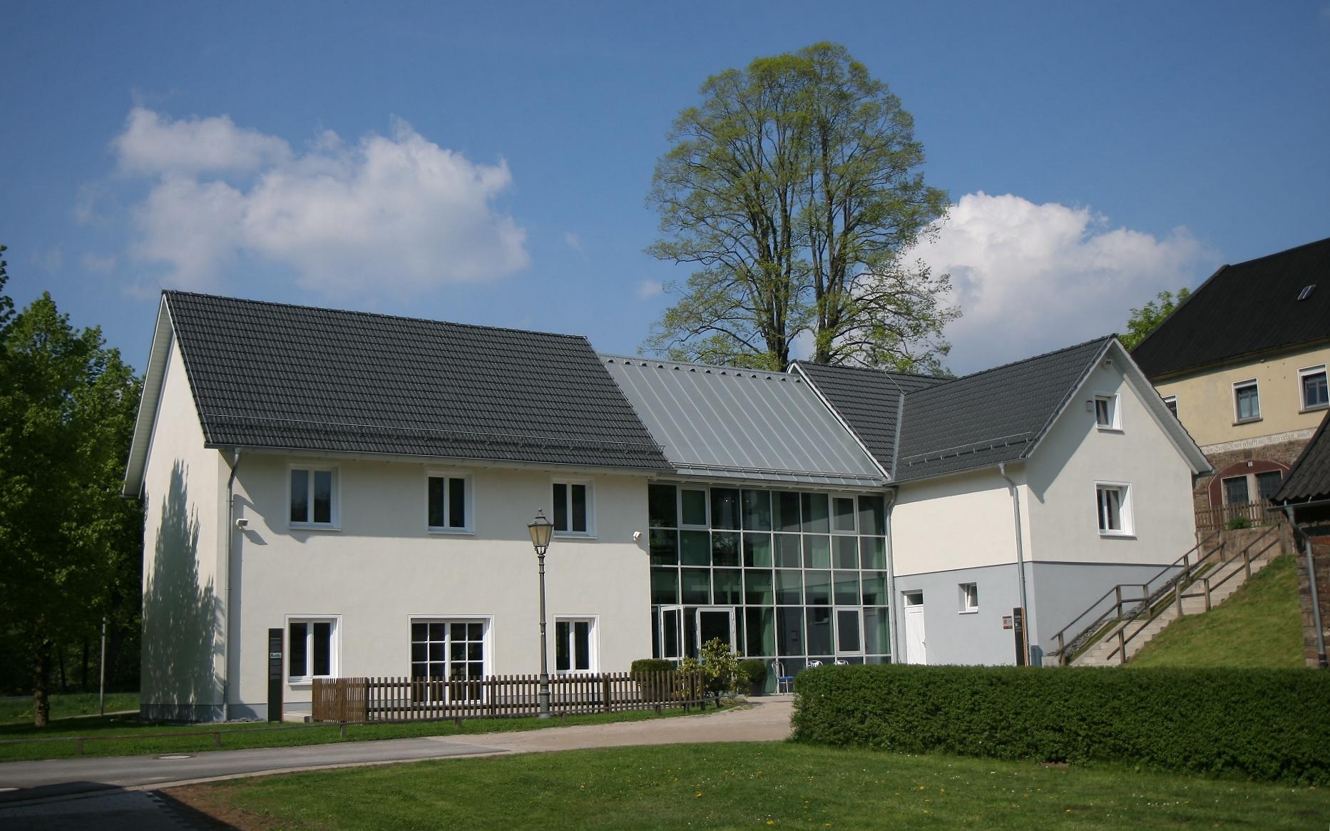 Ausstellungs- und Eingangsgebäude „Alte Faktorei“. Museum Wendener Hütte in Wenden.